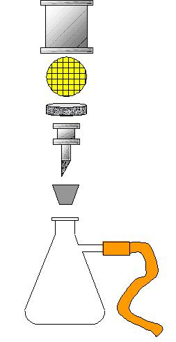 crer par alpha.prim le 4 janvier 2006 pour l'article filtration sur membrane Licensing Catégorie:Image de chimie